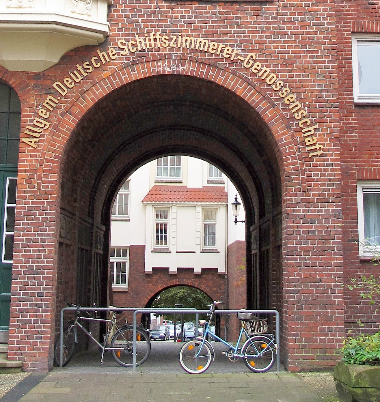 Allgemeine Deutsche Schiffszimmerer-Genossenschaft, Hamburg. Blick von der Wincklerstrasse 7 in den Thielickestieg von Norden nach Süden entlang durch zwei Durchgänge. Die Kfz hinter dem zweiten Durchgang stehen in der Straße Anberg.This is a photograph of an architectural monument.